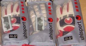 Torwarthandschuhe Uhlsport